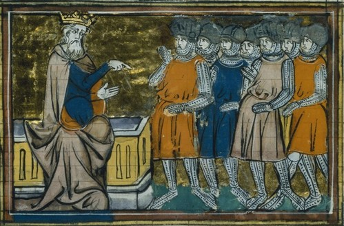 Baudouin IX de Flandre et les chevaliers